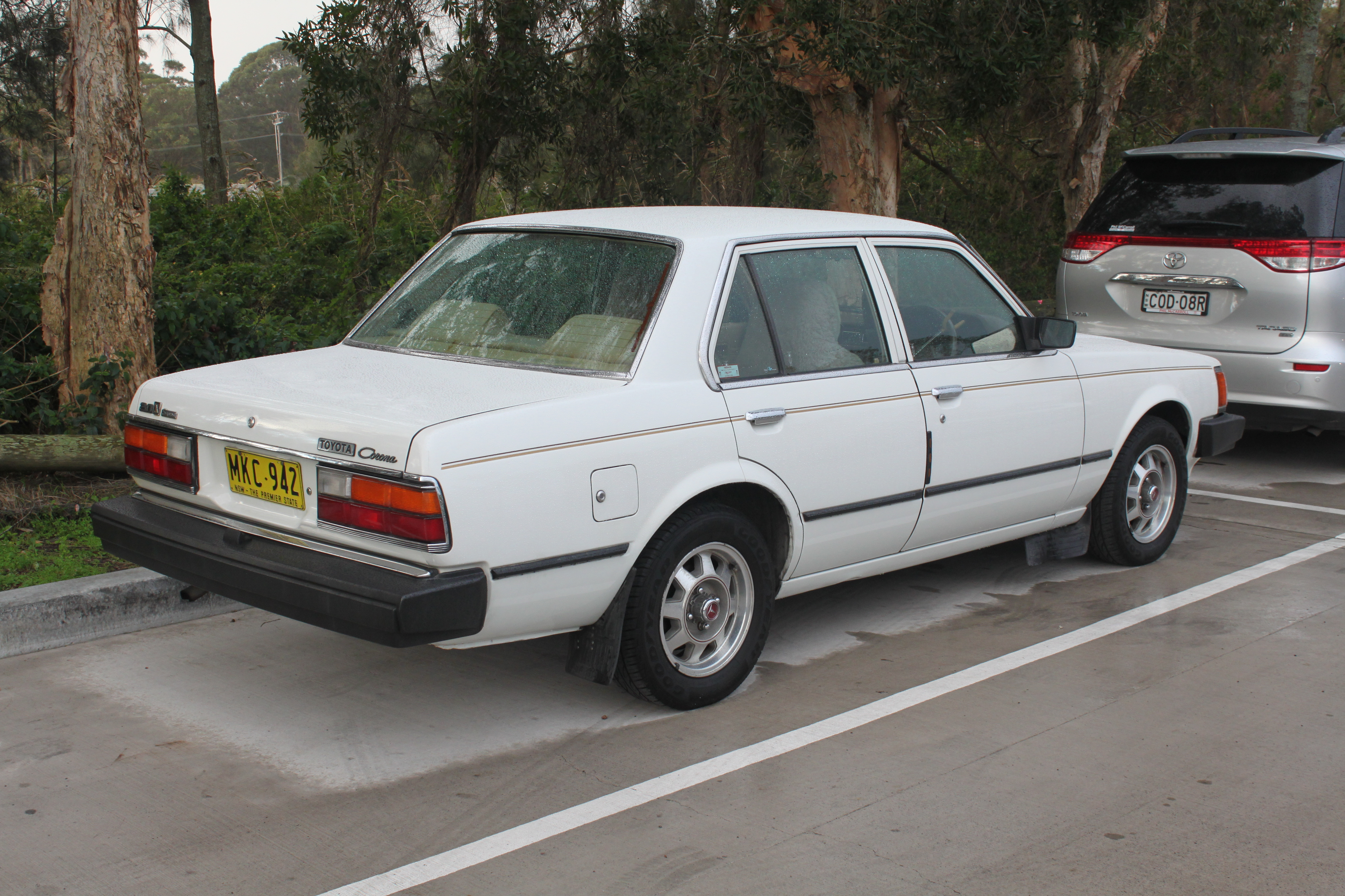 Toyota Corona RT133 XX